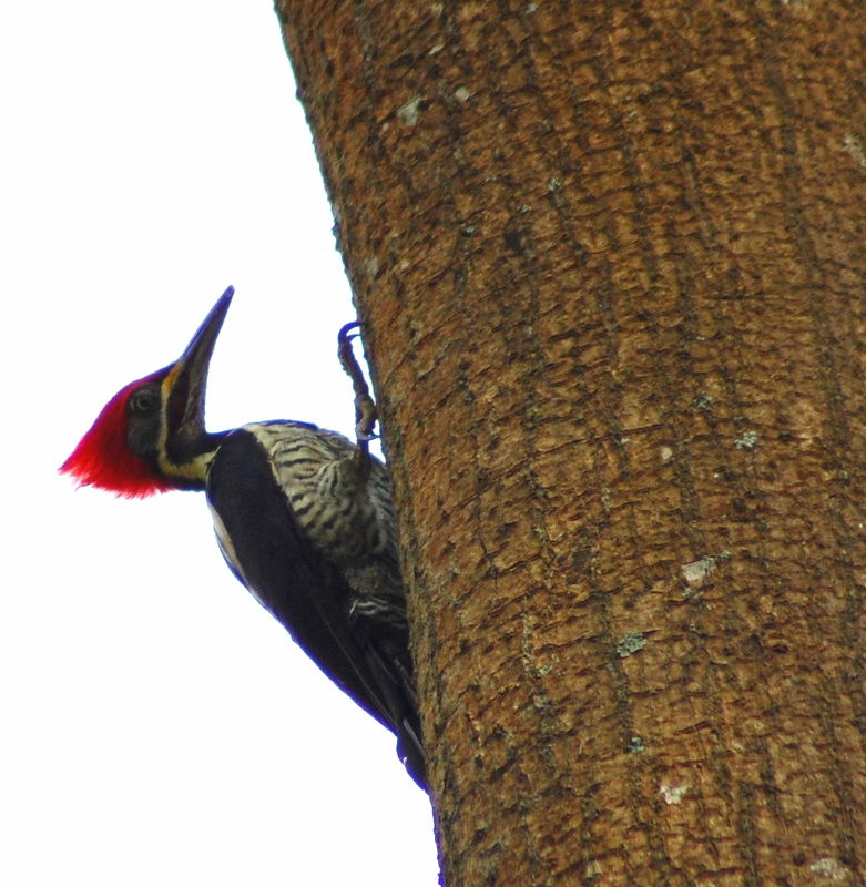 Dryocopus lineatus Jardim Botânico de São Paulo